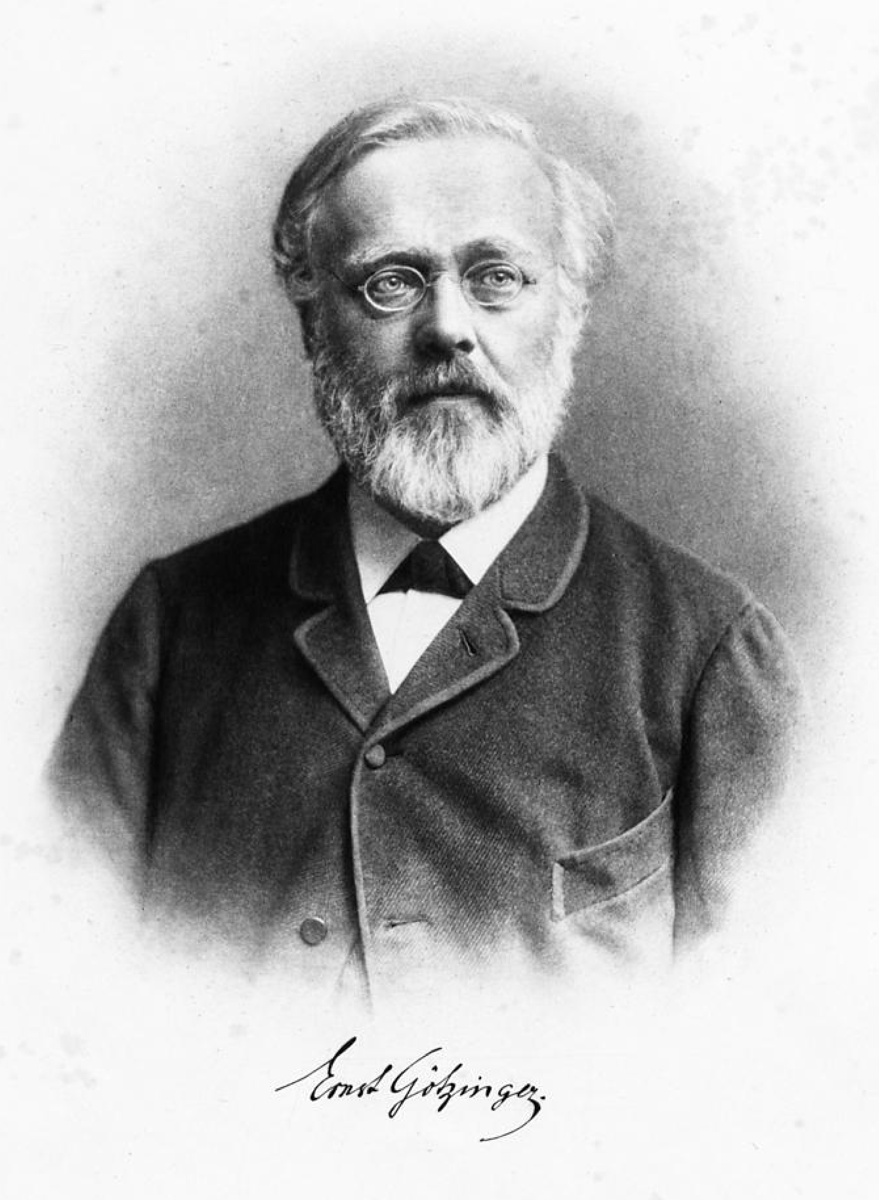 Ernst Götzinger : ein Lebensbild ; mit Porträt. St. Gallen : Fehr, 1897